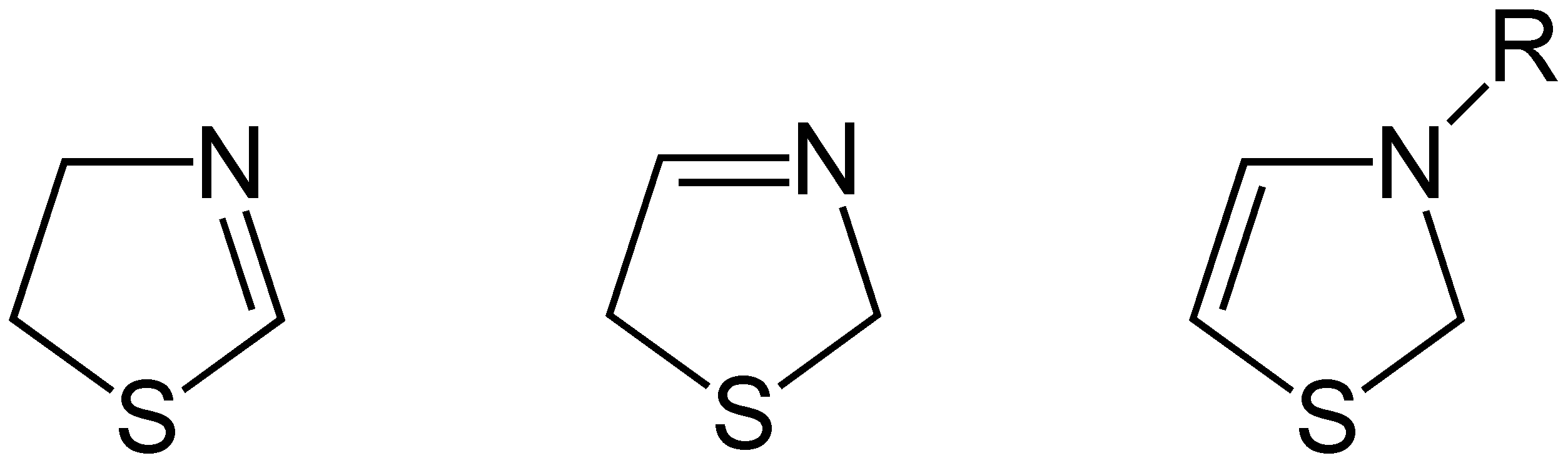 2-Thiazoline, 3-Thiazoline und 4-Thiazoline (Chemische Formeln)